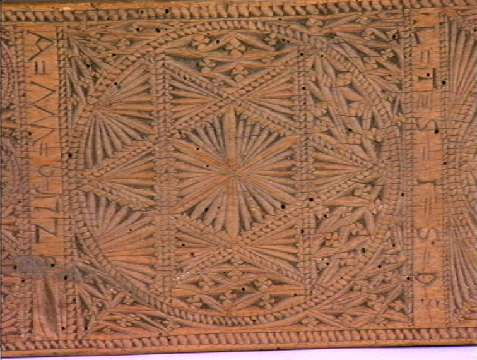 Detalg av mangletre fra Froland i Aust-Agder med innskrift "LTJSD / ANNO 1728" Norsk Folkemuseum. NF.1906-1770. Kan være importarbeid fra Jylland eller Slesvik.